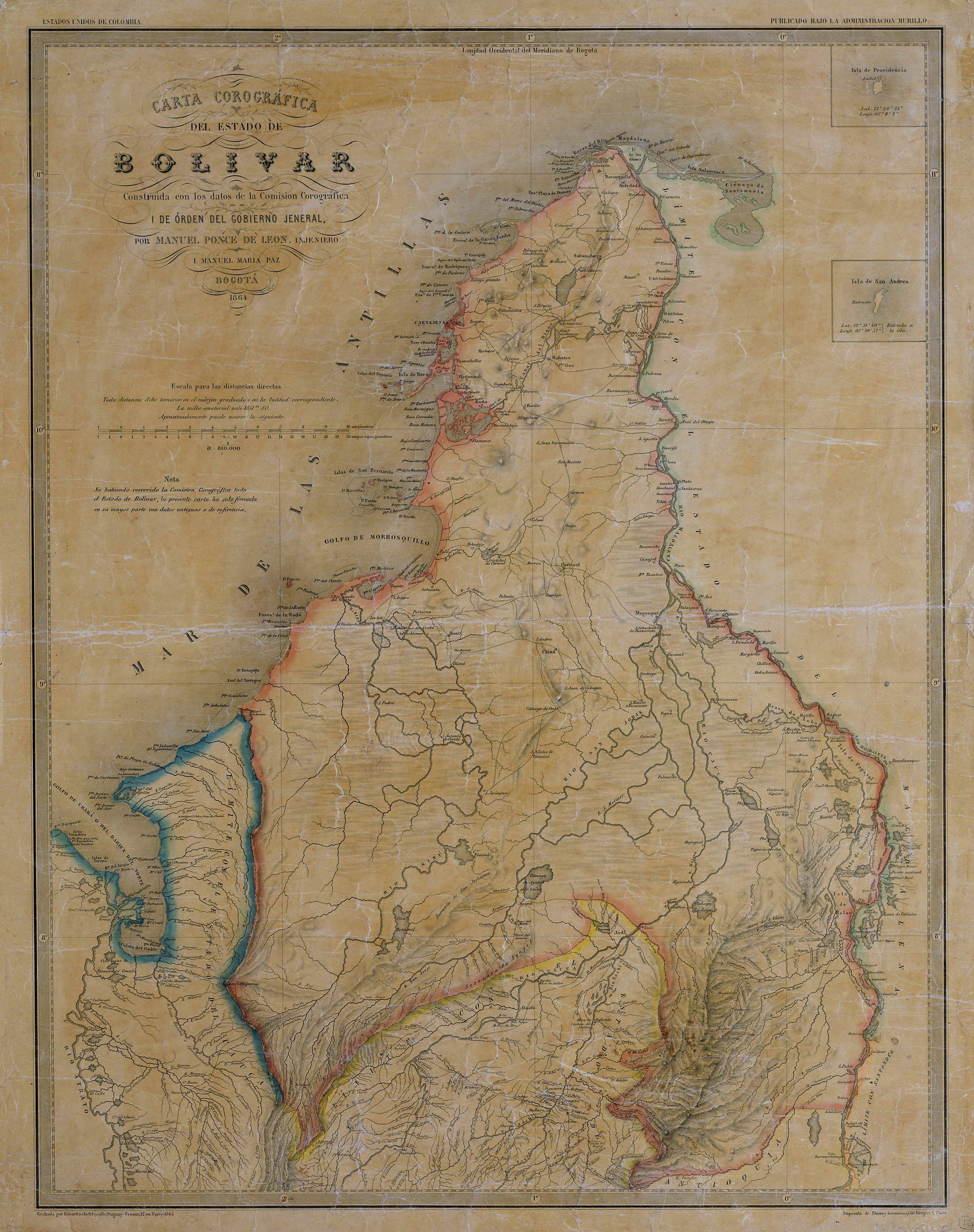 Carta Corográfica del Estado Soberano de Bolívar. Tomado del "Atlas de los Estados Unidos de Colombia, antigua Nueva Granada", 1865.